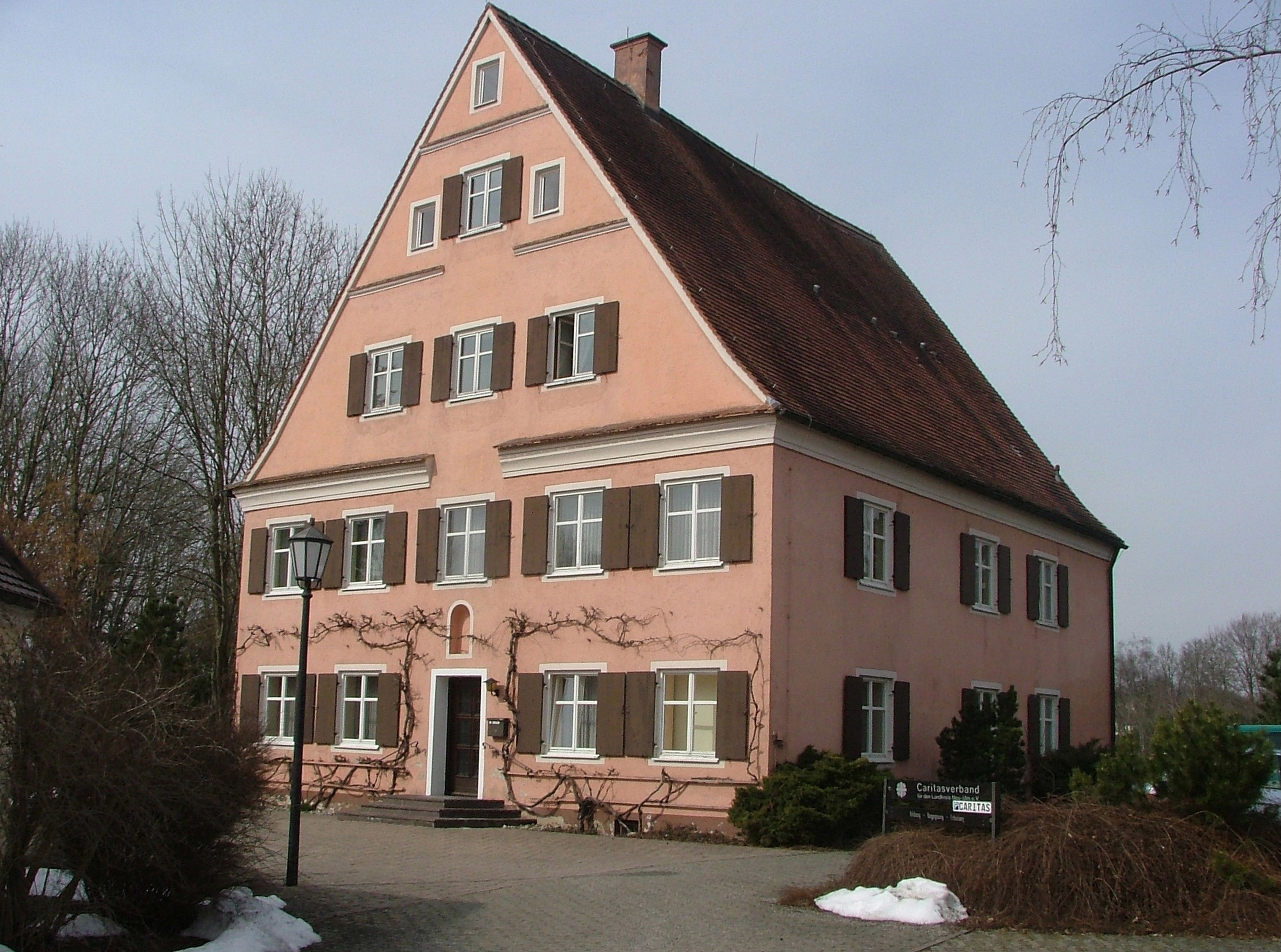 Illereichen Pfarrhof